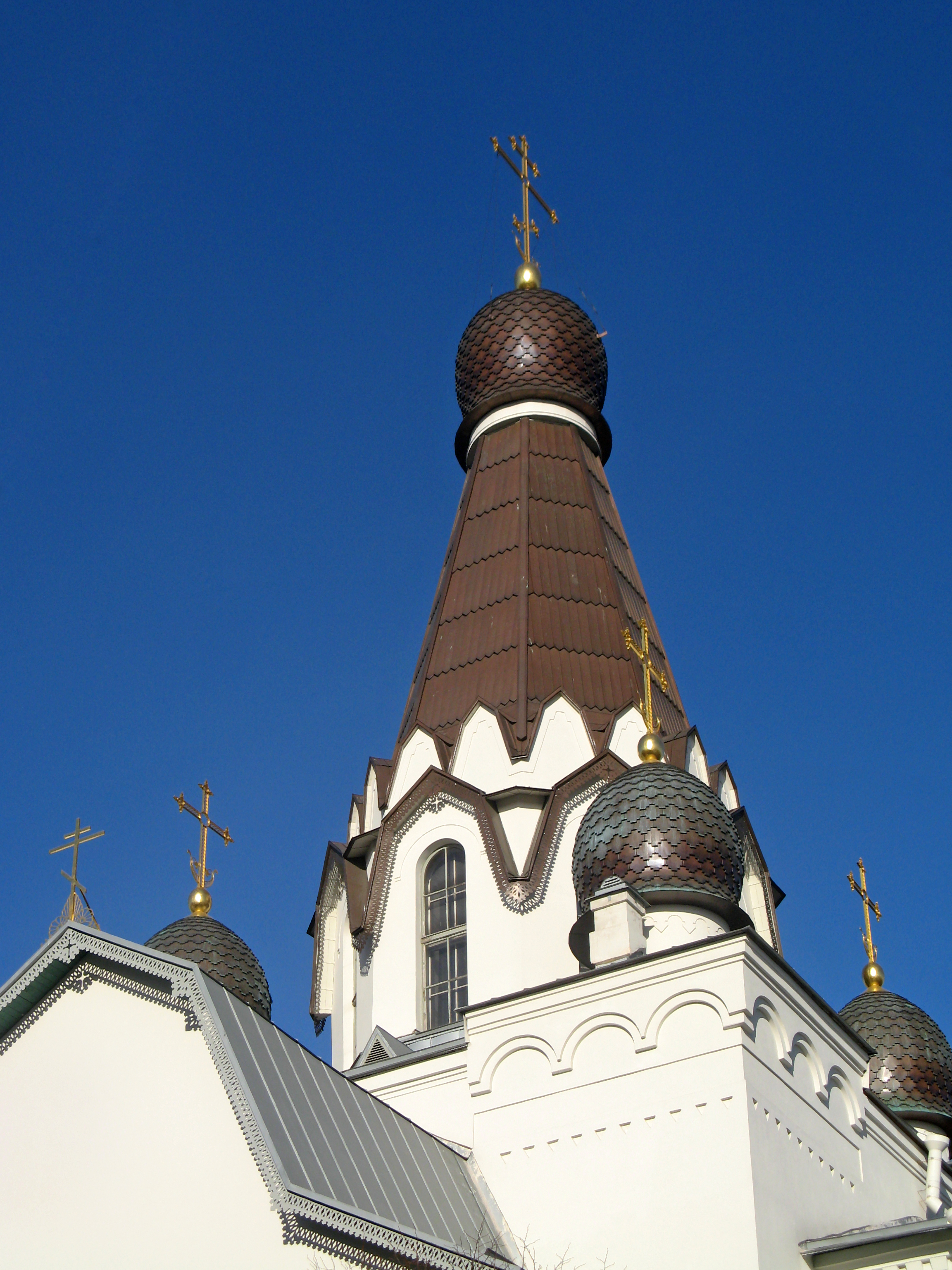 Здание подворья с церковью Святого Петра Митрополита: Роменская улица, 12, Днепропетровская улица, 19, Центральный район, Санкт-Петербург